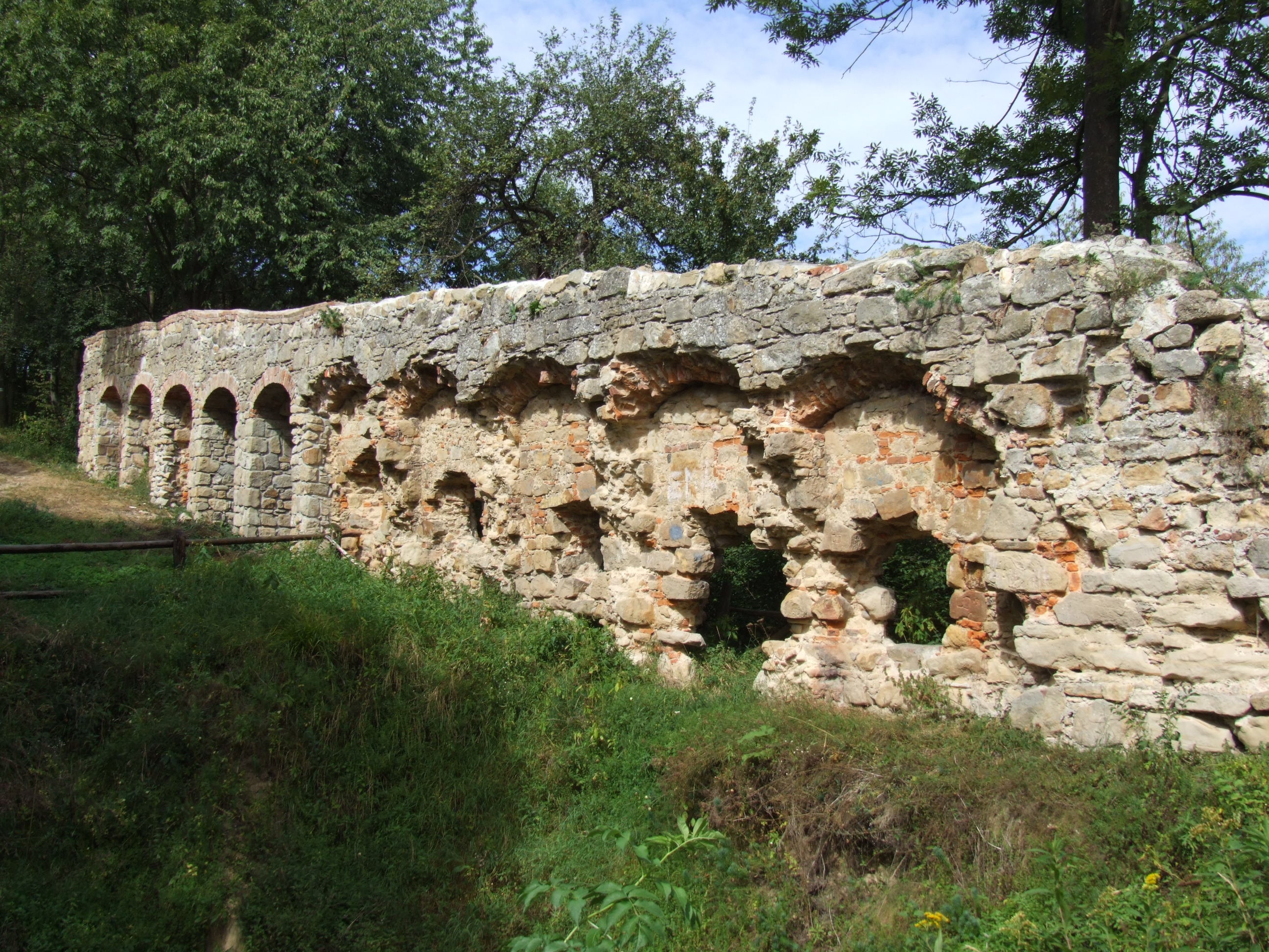 Melsztyn - pozostałości muru przy ruinach zamku